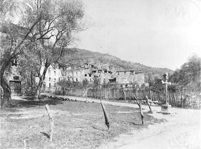 Soldano 1900